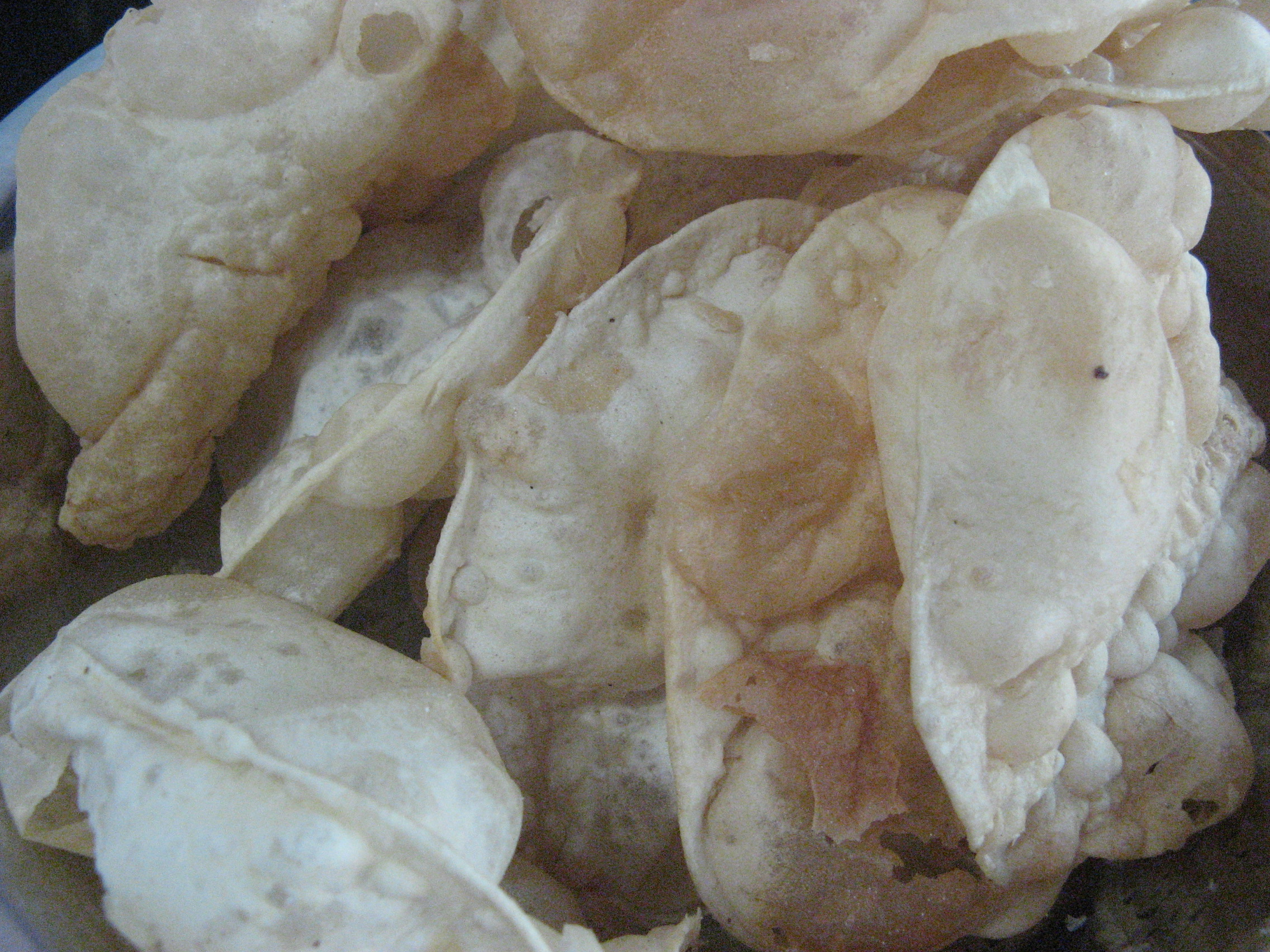 പപ്പടം കാച്ചിയത്